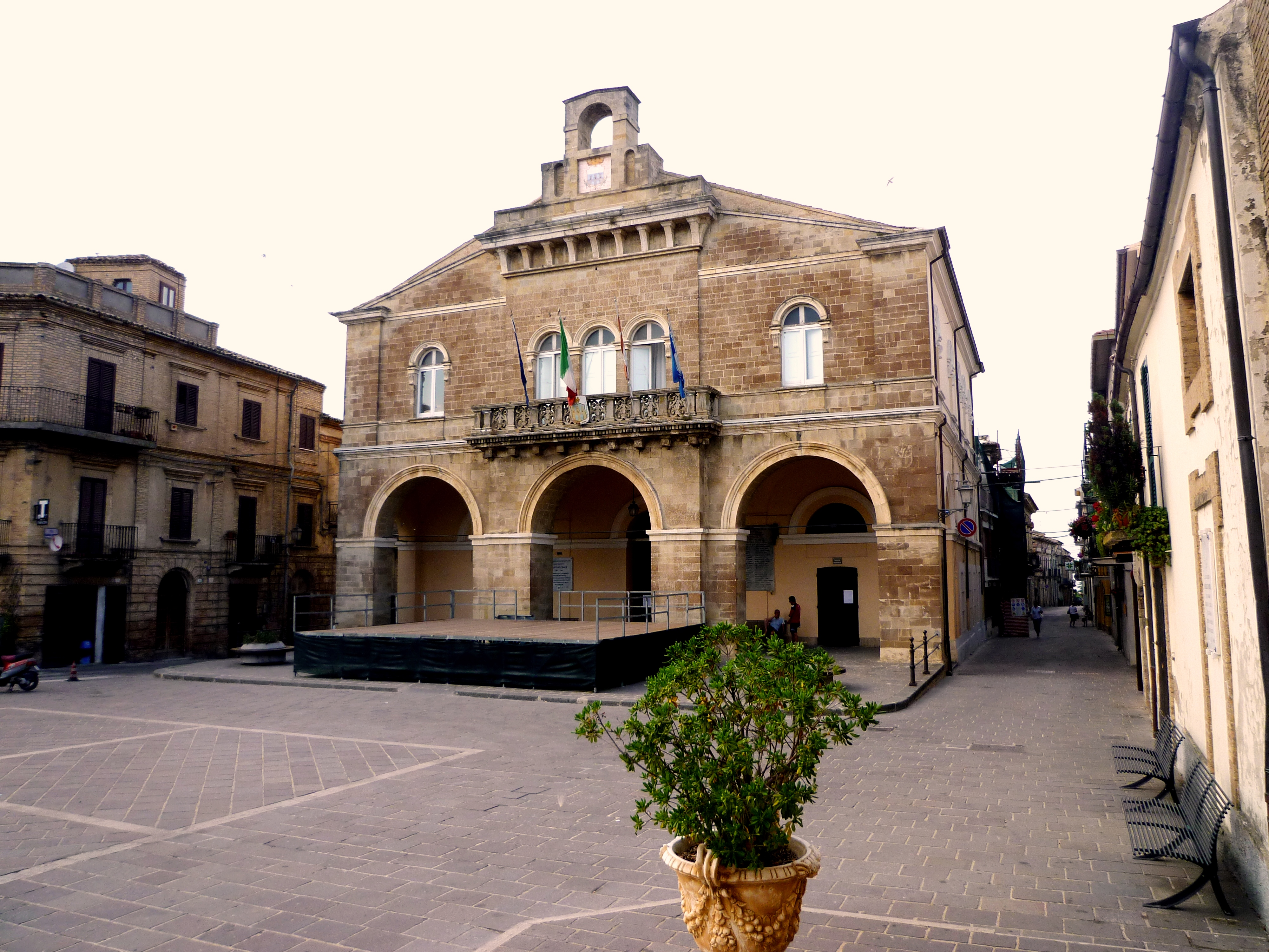 Il palazzo comunale di Rocca San Giovanni, Chieti.